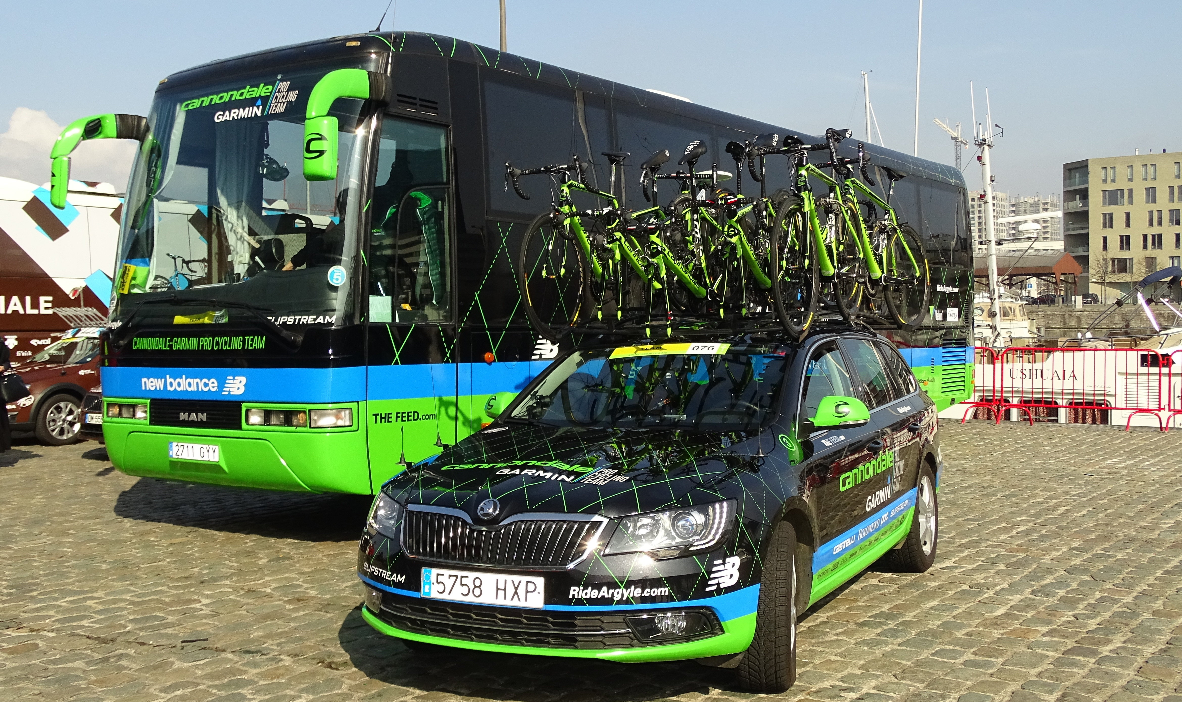 Reportage réalisé le mercredi 8 avril à l'occasion du départ du Grand Prix de l'Escaut 2015 à Anvers, Belgique.